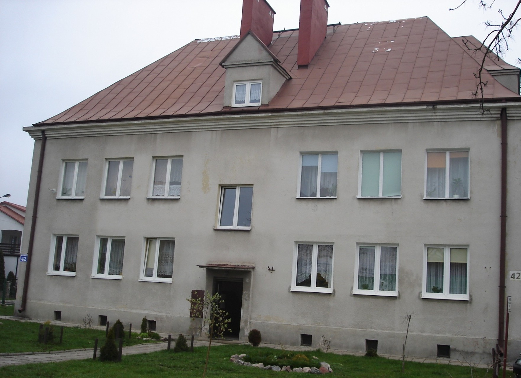 Garnizon Przasnysz, blok mieszkalny osiedla wojskowego nr 42